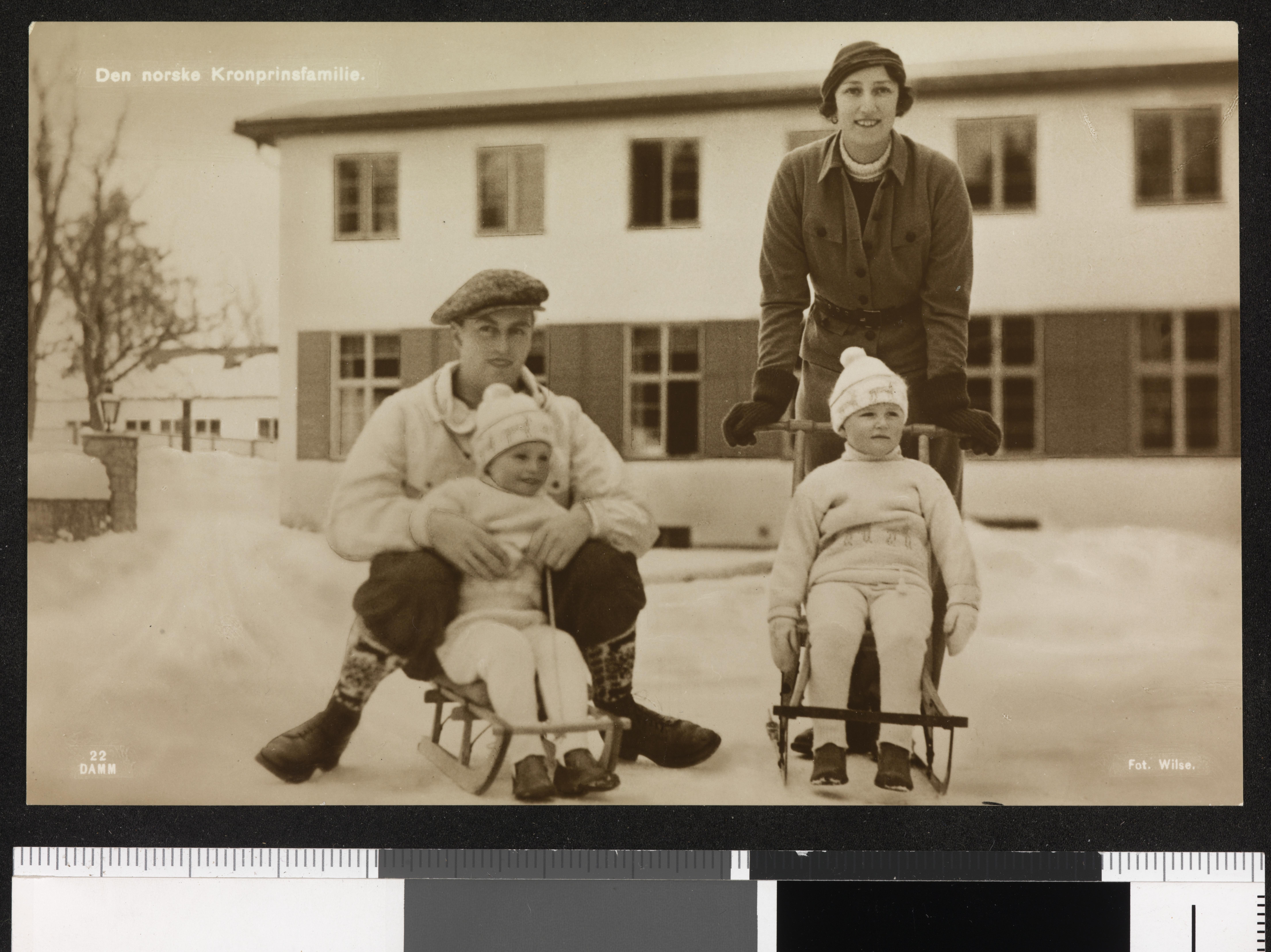 Bildet er hentet fra Nasjonalbibliotekets bildesamling. Anmerkninger til bildet var: Det er vanskelig å avgjøre sikkert hvem av barna som er Ragnhild (f. 1930) og hvem som er Astrid (1932). Depicted person: Olav V